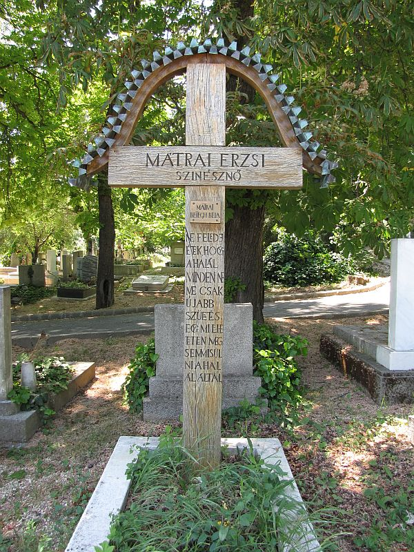 Mátray Erzsi (Budapest, 1894. március. 16. – Budapest, 1968. augusztus 15.) színésznő és Mátrai Betegh Béla (Budapest, 1914. április 3. – Budapest, 1981. május 15.) újságíró, kritikus sírja Budapesten. Farkasréti temető: 18-1-60.